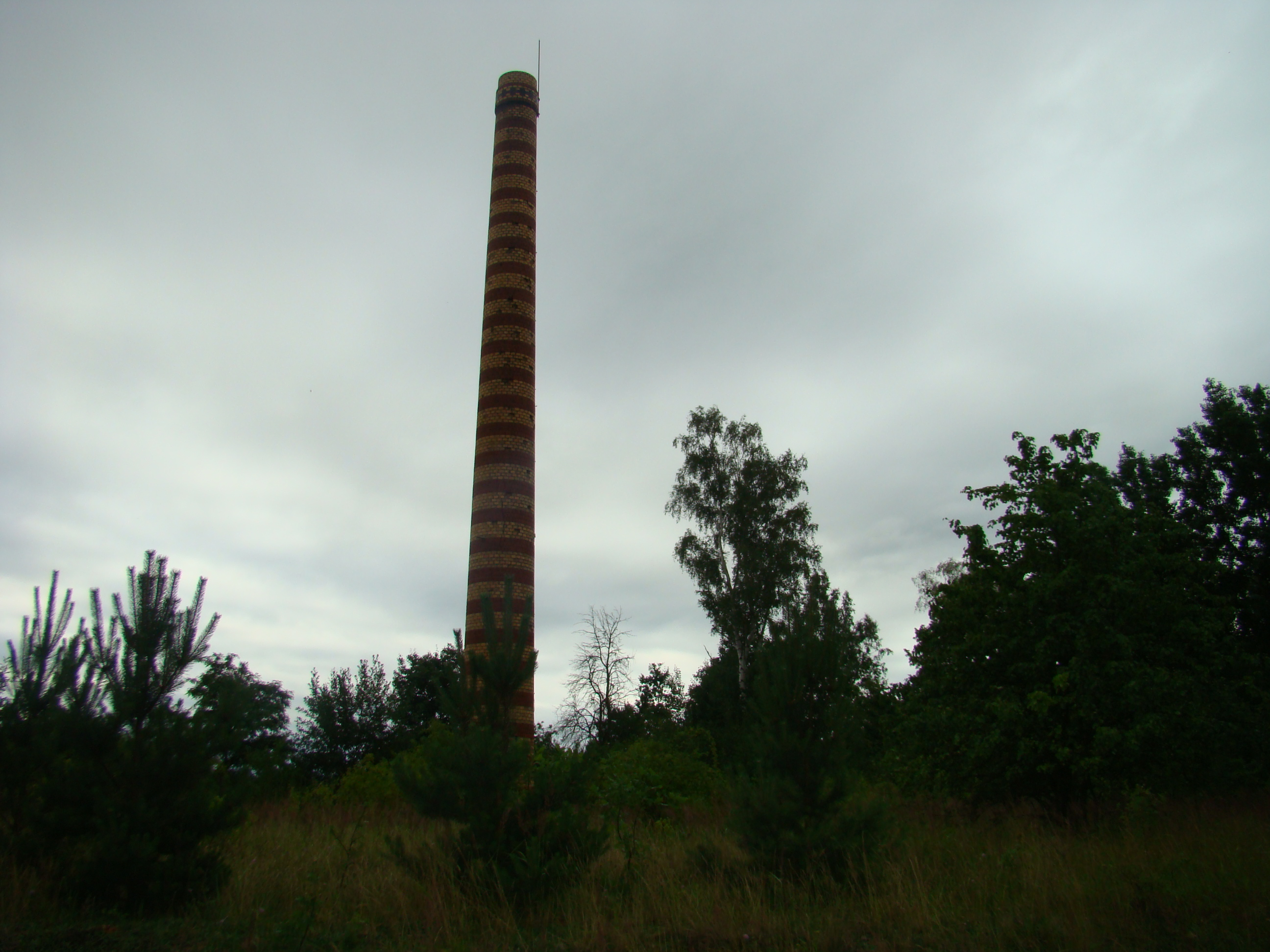 Ruine des Sägewerkes in Gräfenhain, heute Grotów.